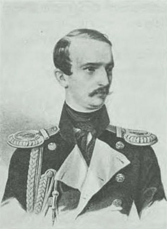 Карл Карлович Ламберт (1815—1865)